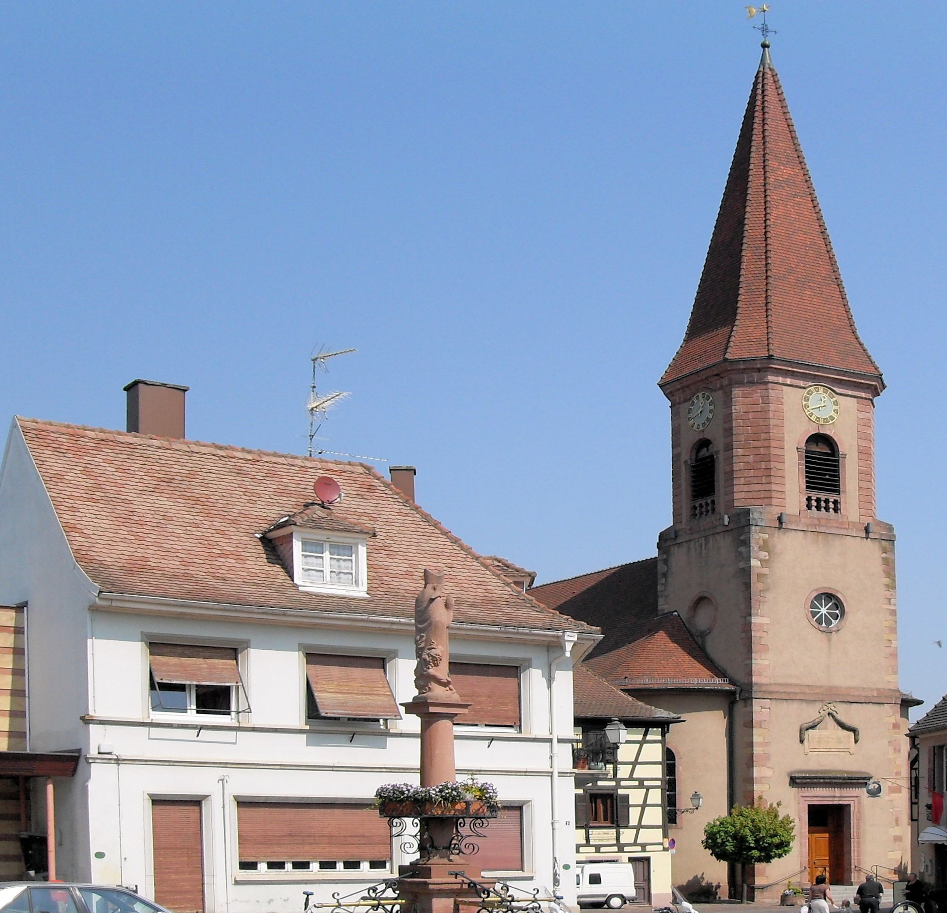 La Place du Général-de-Gaulle et l'église Saint-Rémi à Wettolsheim